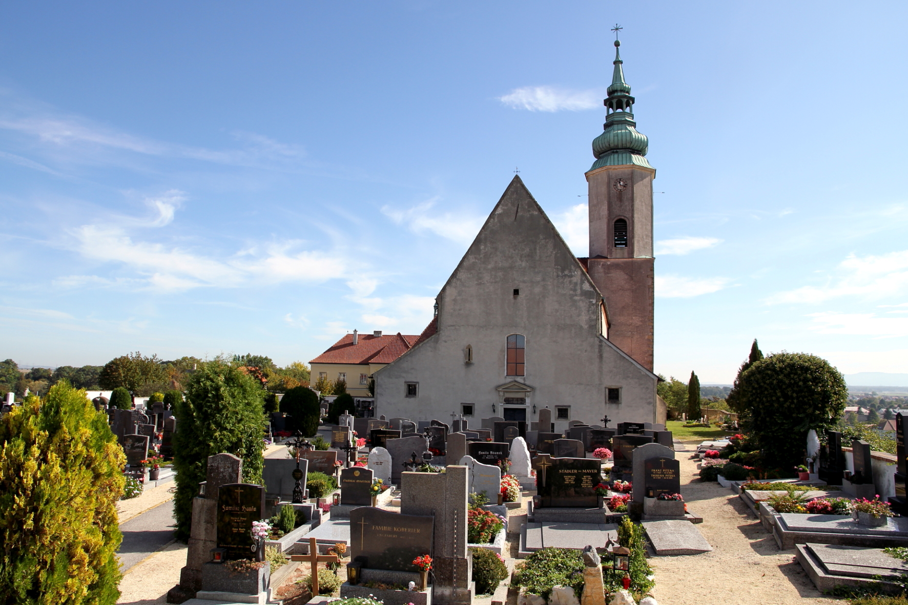 Die katholische Pfarrkirche hl. Agatha in der niederösterreichischen Gemeinde Hausleiten.